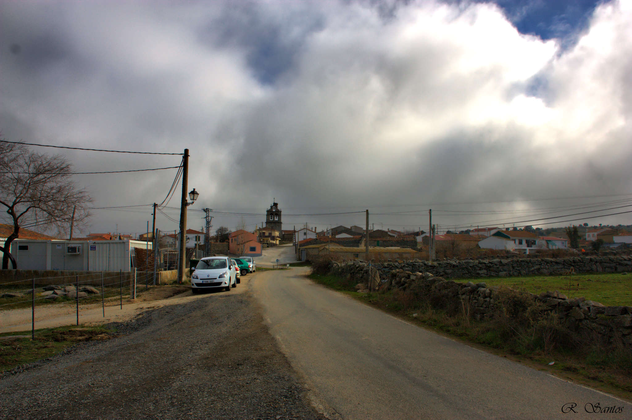 Zapardiel 5 (2011)